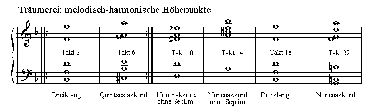 Melodisch-harmonische Höhepunkte in der Träumerei aus Robert Schumanns Kinderszenen Op.15. In Anlehnung an Erkenntnisse von Alban Berg